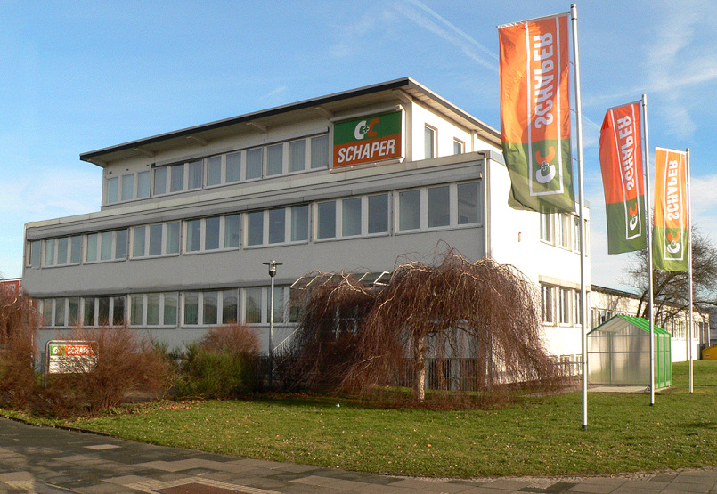 Firma C + C Schaper in Hannover